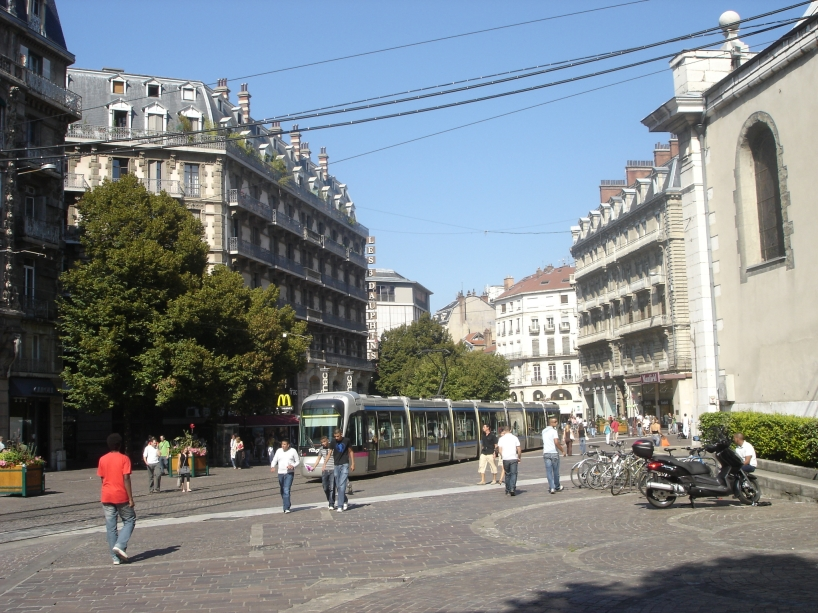 Трамвайно-пешеходная улица во Франции.